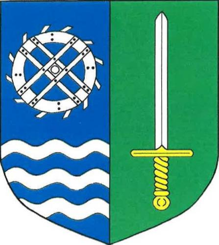 znak, Těchonín, okres Ústí nad Orlicí